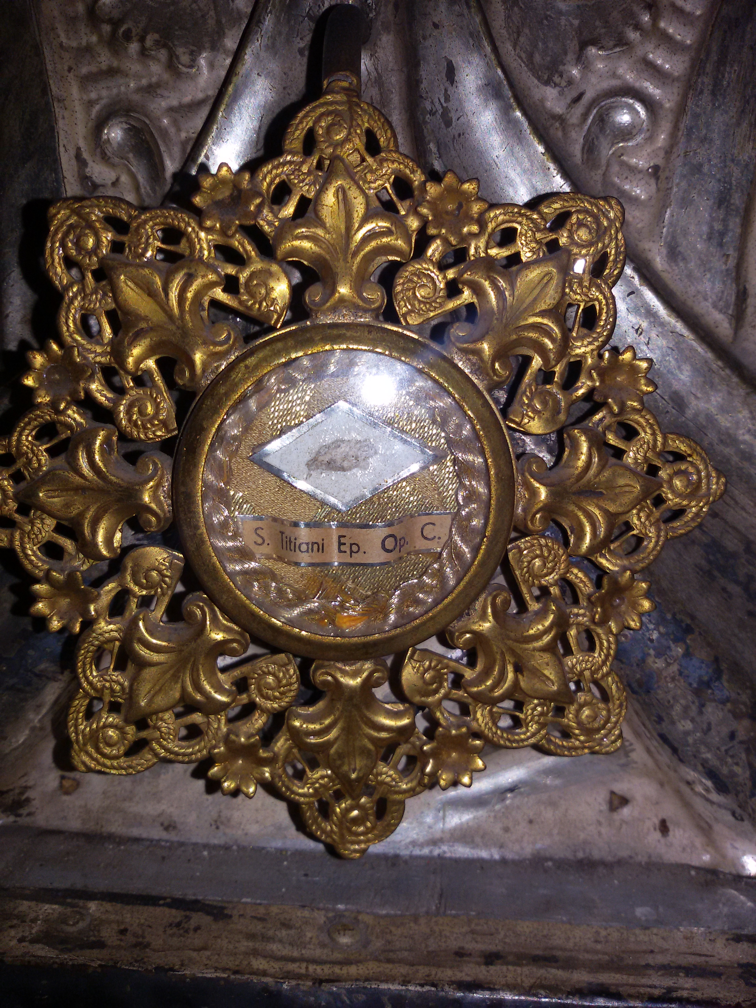 Santa Cristina, Quinto di Treviso: chiesa di Santa Cristina Vergine e Martire del Tiverone, interno, reliquia di San Tiziano.